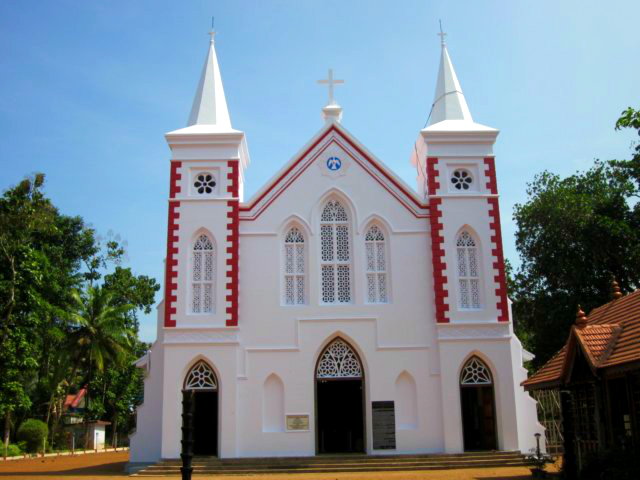 തോമാശ്ലീഹ ക്രി. വ. 54-ൽ സ്ഥാപിച്ച നിരണം പള്ളി